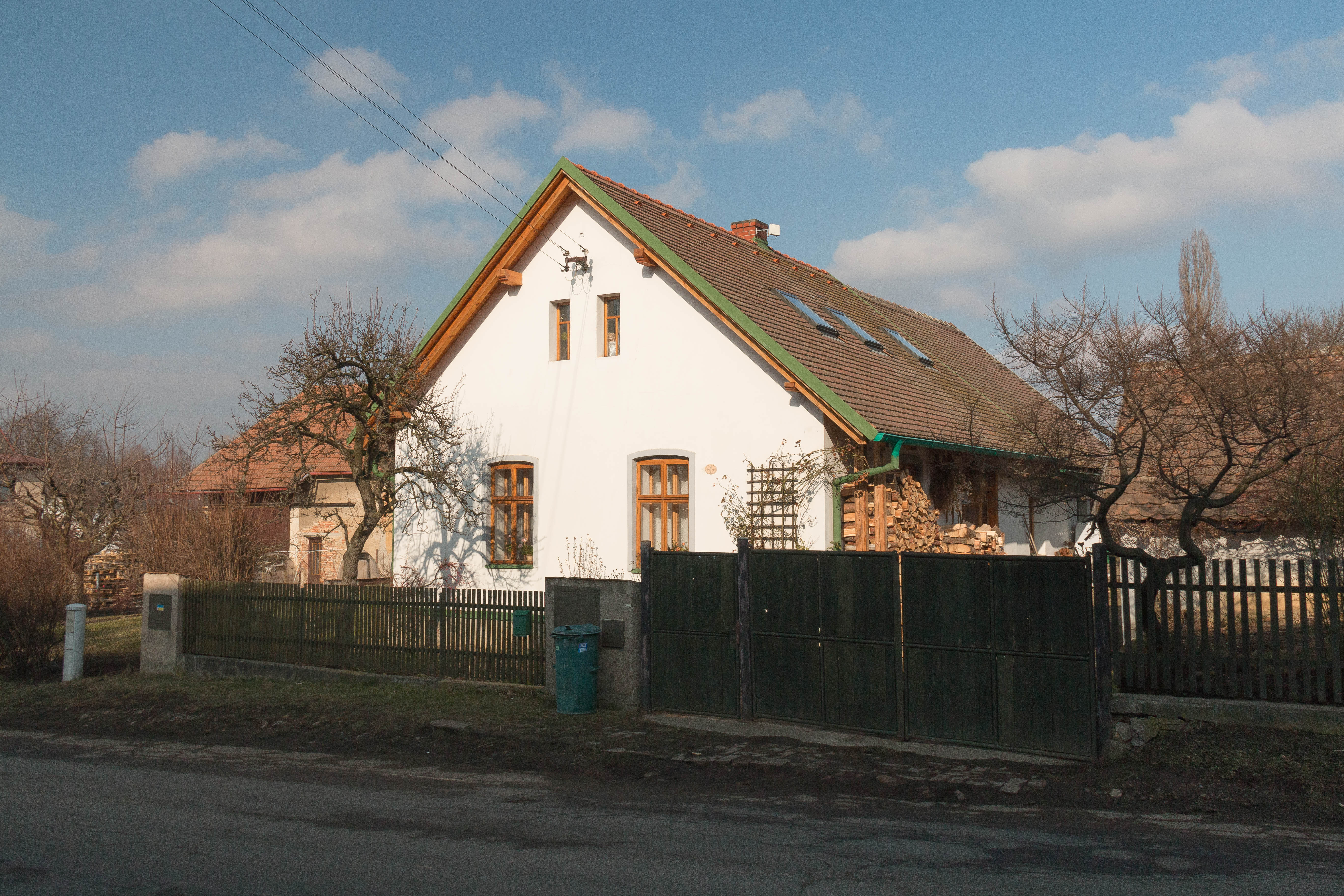 Lukavička čp. 1